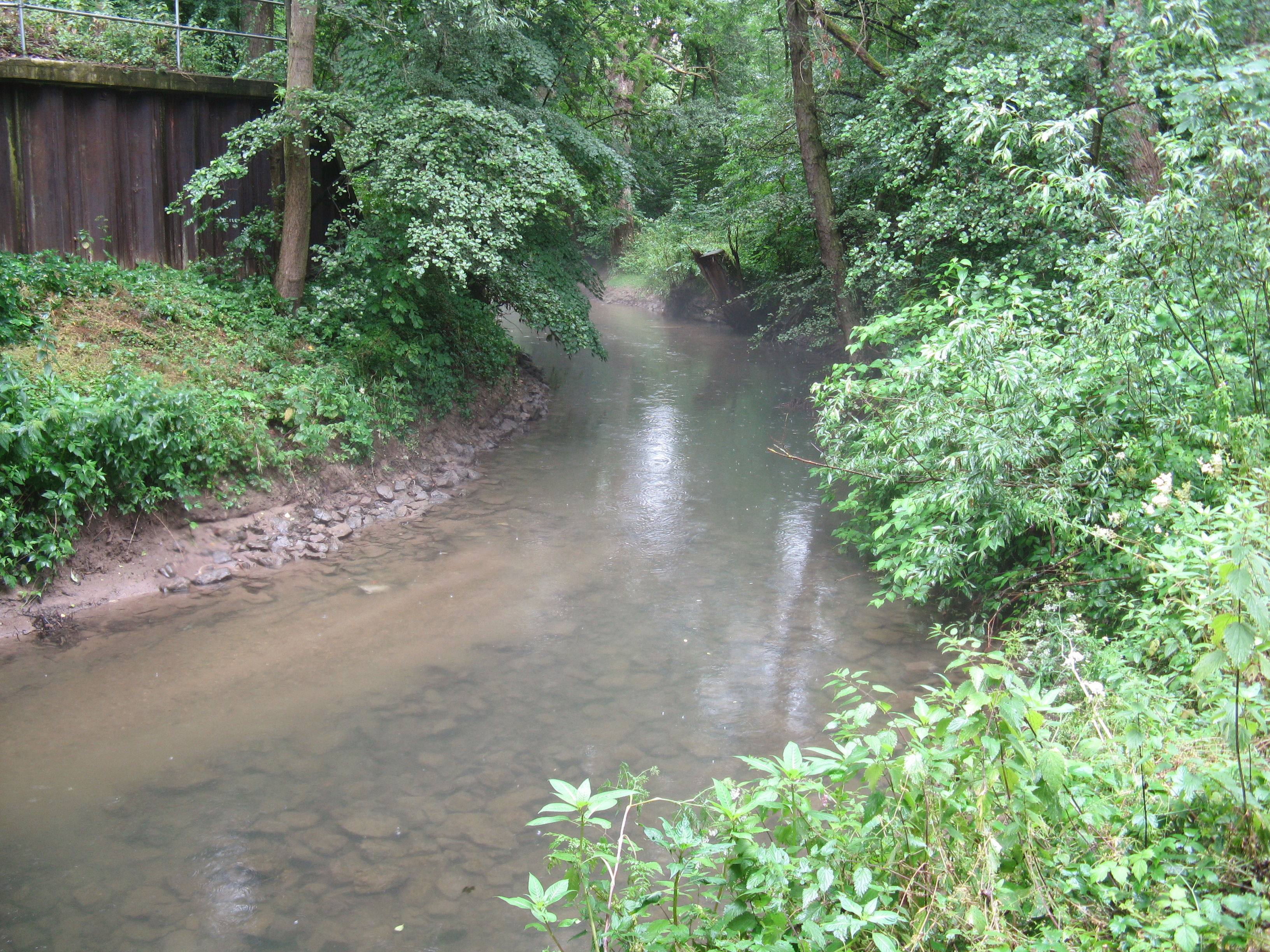 Die untere Humme